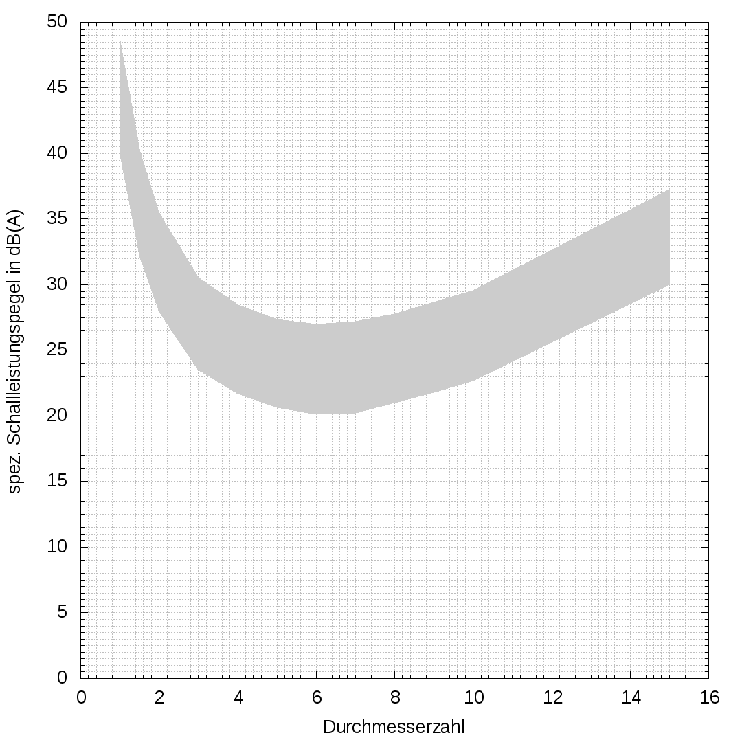 Abhängigkeit des spezifischen Schallleistungspegels von der Durchmesserzahl von ausgeführten Ventilatoren. Ventilatoren mit guten akustischen Eigenschaften liegen in dem grau markierten Bereich. Basierend auf den Angaben von "Schlender F., Klingenberg G.: Ventilatoren im Einsatz, VDI-Verlag, Düsseldorf, 1996"